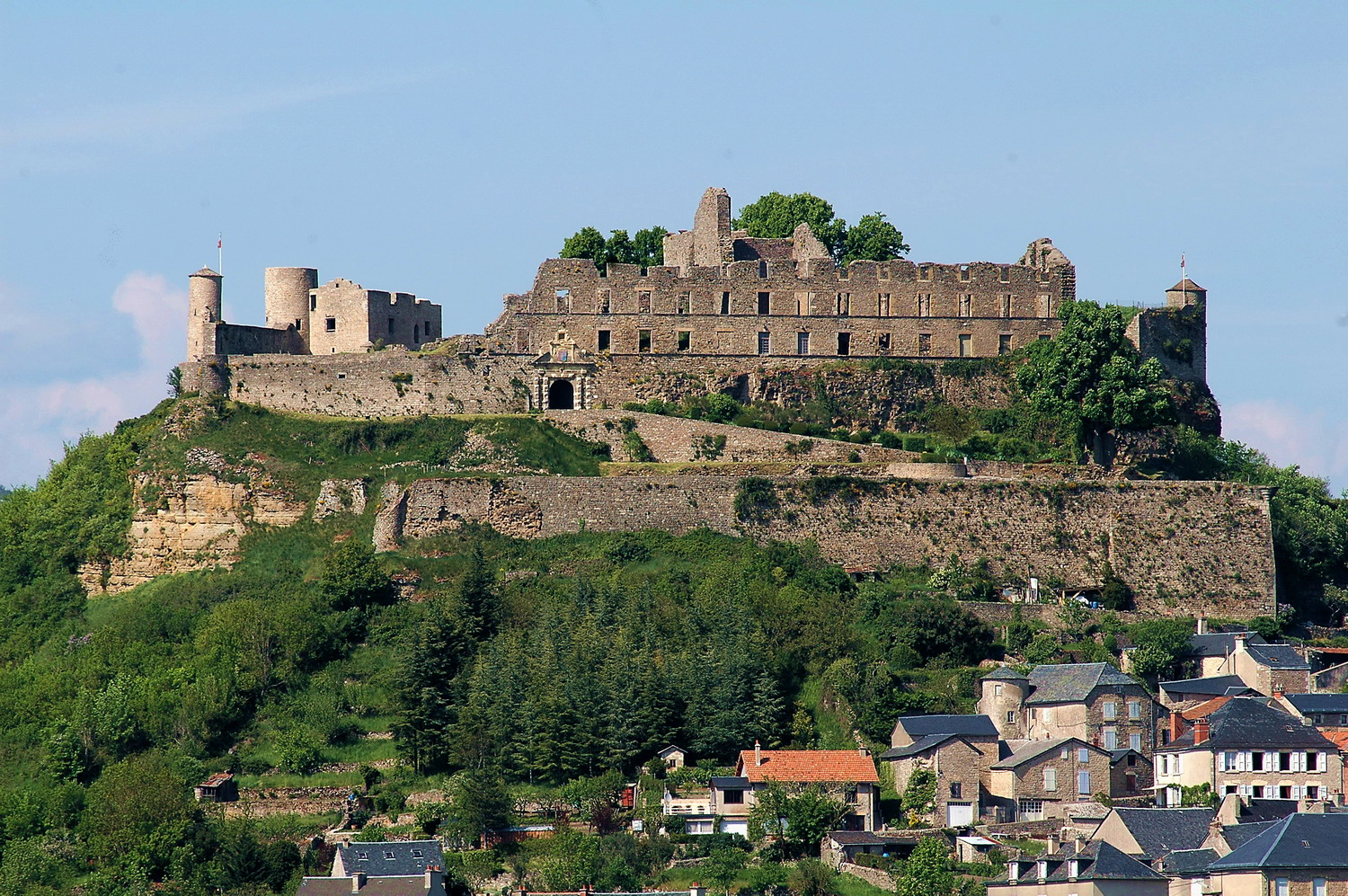 façade du château de Sévérac-le-Château (Aveyron)